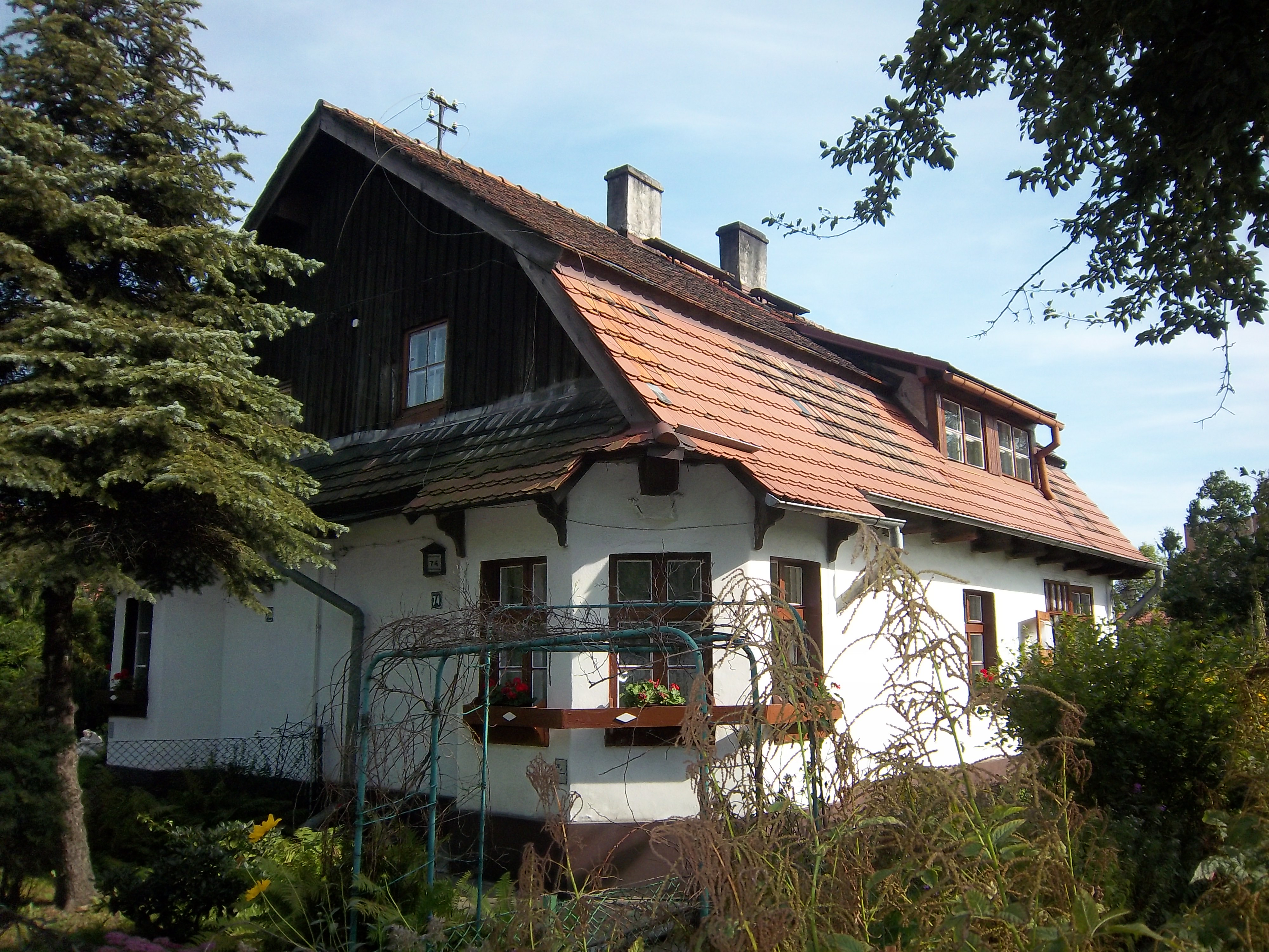 Fragment osiedla robotniczego Giszowiec z lat 1907-1914 - rynek, szkoła, dawny budynek administracyjny, dawne nadleśnictwo, park centralny, dawna gospoda, budynek łaźni, pralni, magla, dawny zespół domów noclegowych, poczta oraz osiem kwartałów zabudowy mieszkaniowej 08.19.